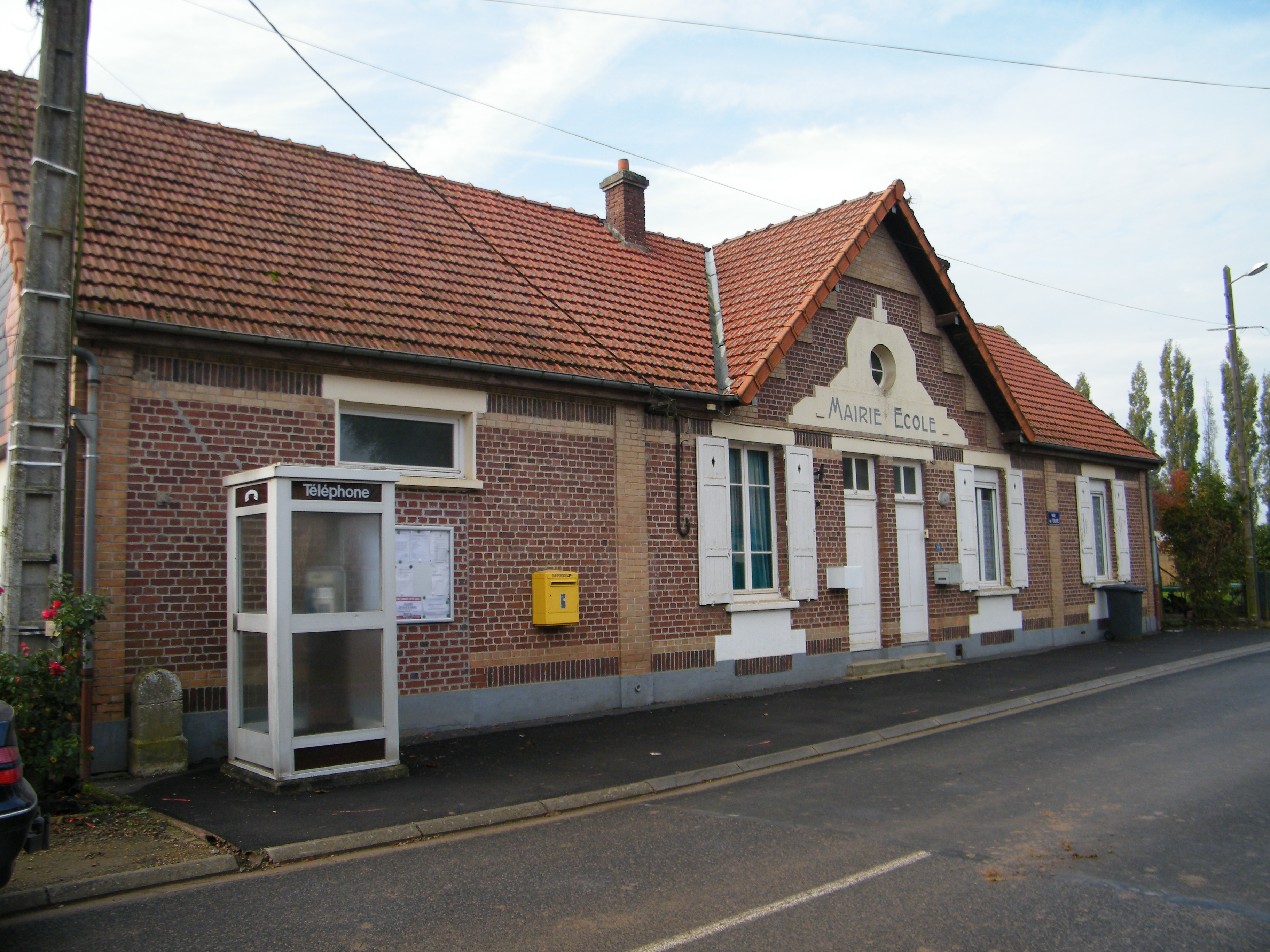 Mairie.